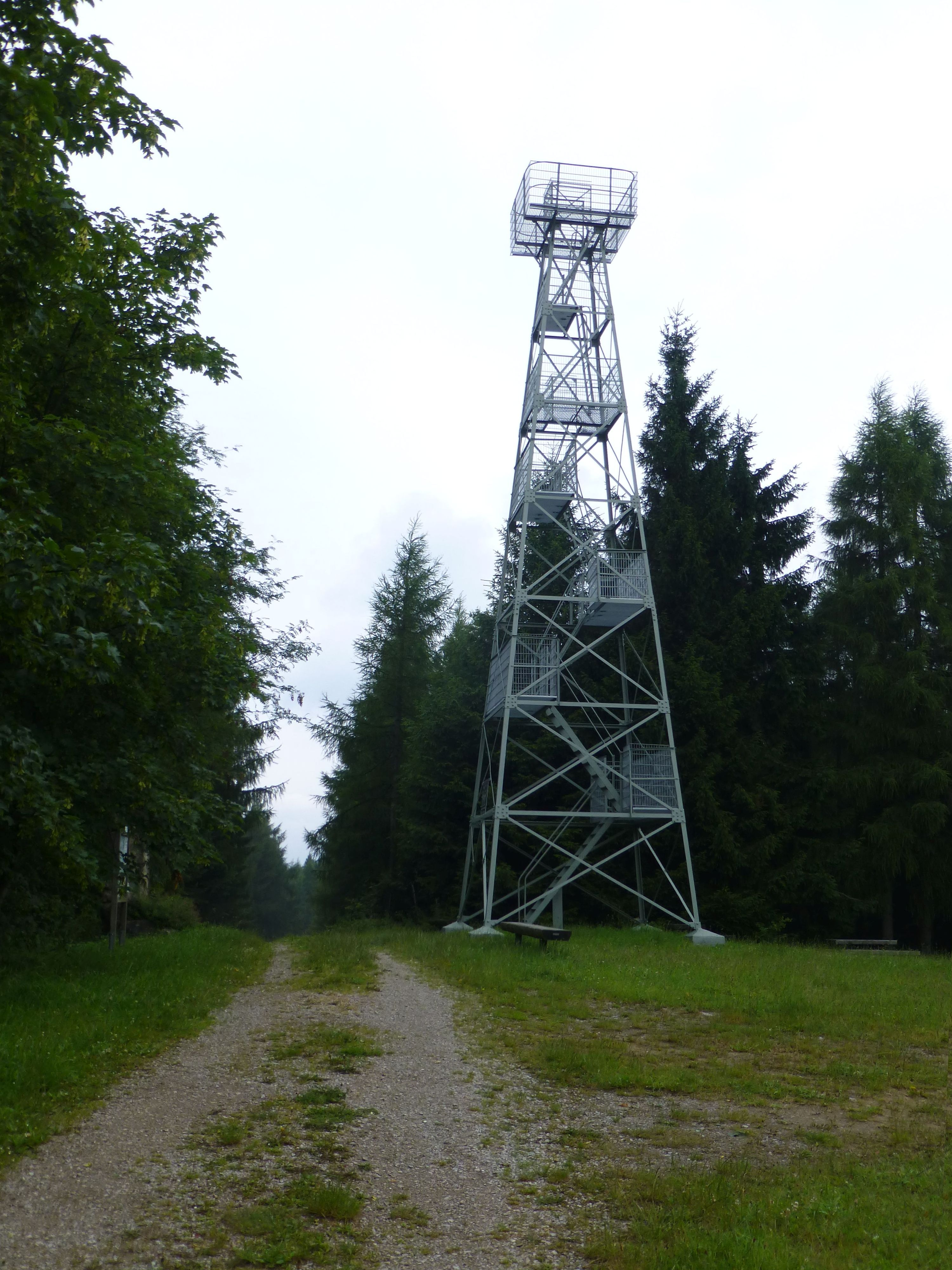 Aussichtsturm auf dem Großen Sohl